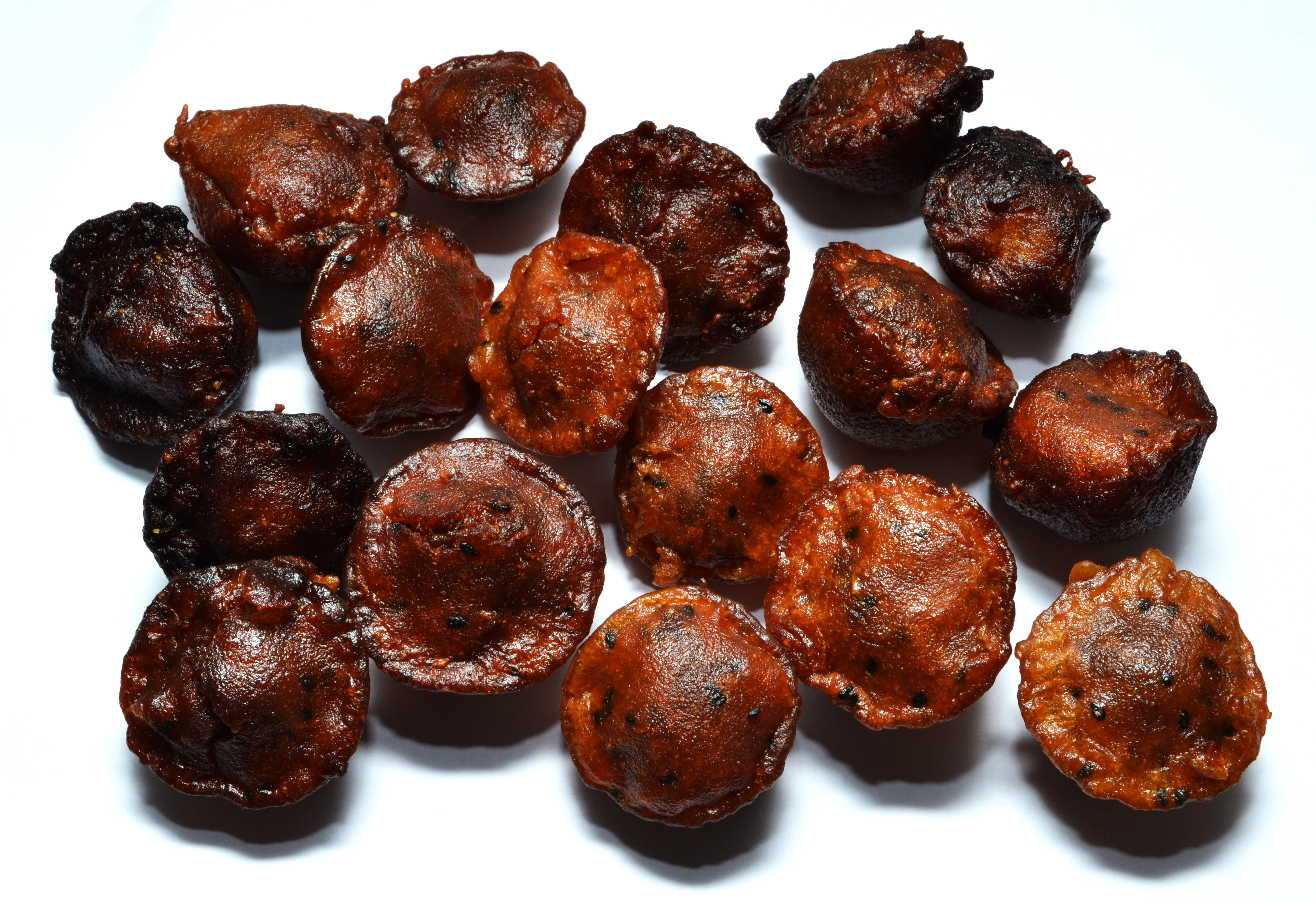 ഒരു കേരളീയ ഭക്ഷണ പദാർത്ഥമാണ് ഉണ്ണിയപ്പം. കുഴിയപ്പം, കാരപ്പം , കാരോലപ്പം എന്നീ പേരുകളിലും അറിയപ്പെടുന്ന ഉണ്ണിയപ്പം ഒരു മധുരമുള്ള പലഹാരമാണ്. വാഴപ്പഴവും, അരിപ്പൊടിയും, ശർക്കരയുമാണ് ഉണ്ണിയപ്പം ഉണ്ടാക്കാൻ വേണ്ട സാധനങ്ങളിൽ പ്രധാനപ്പെട്ടവ. ഗോളാകൃതിയാണ് ഈ പലഹാരത്തിന്.